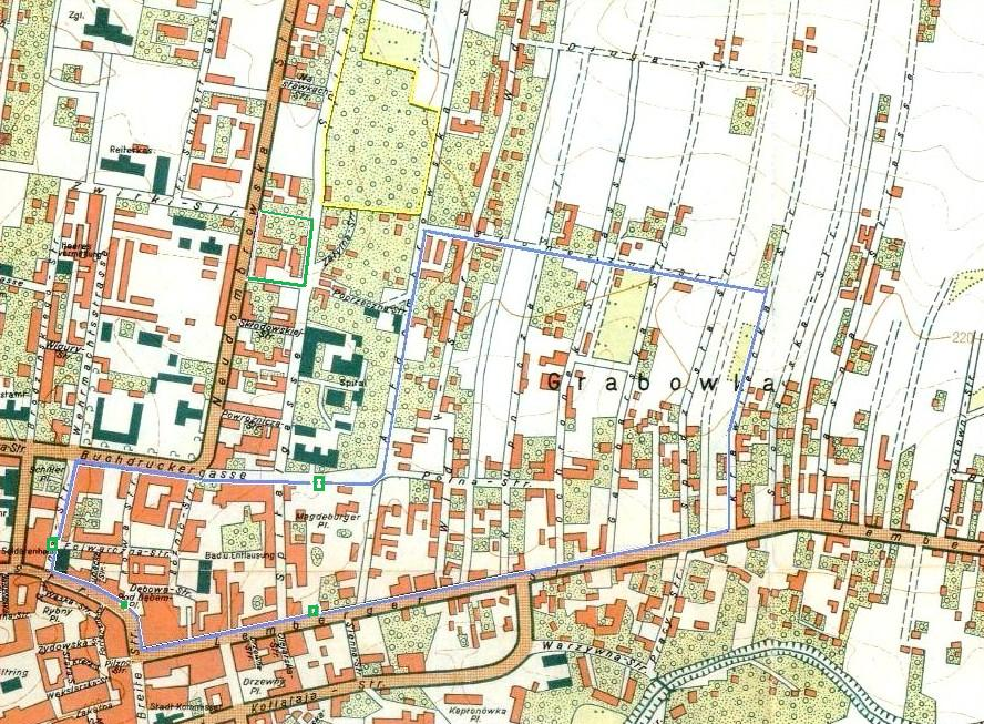 Granice wyznaczonej przez Niemców "stałej dzielnicy żydowskiej" w w Tarnowie od sierpnia 1942 do września lub listopada 1942. Granice getta oznaczone niebieskim kolorem (bramy zielonymi prostokątami), cmentarz żydowski żółtym kolorem, kompleks budynków szpitala żydowskiego zielonym kolorem.